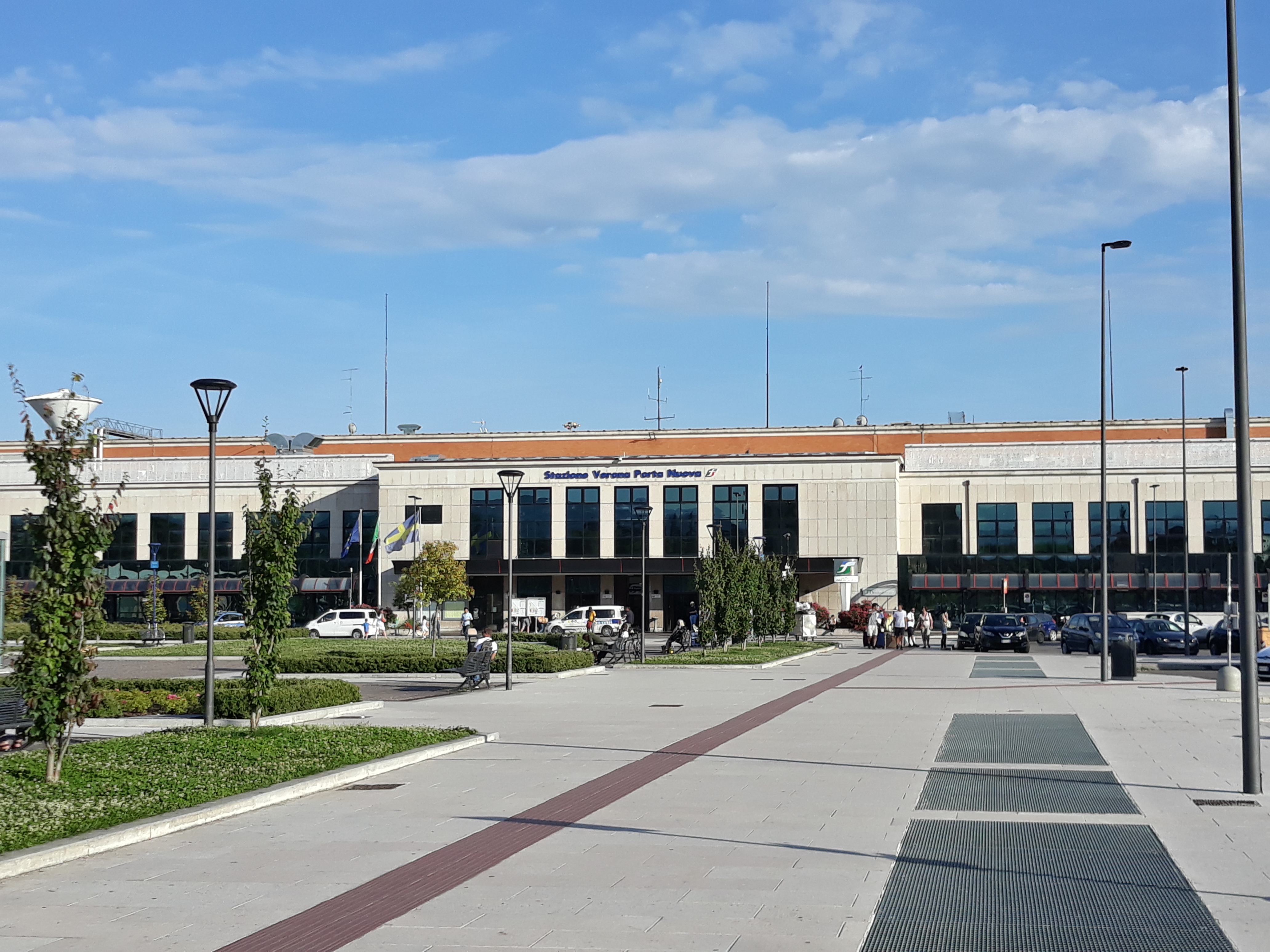 Stazione ferroviaria di Verona Porta Nuova